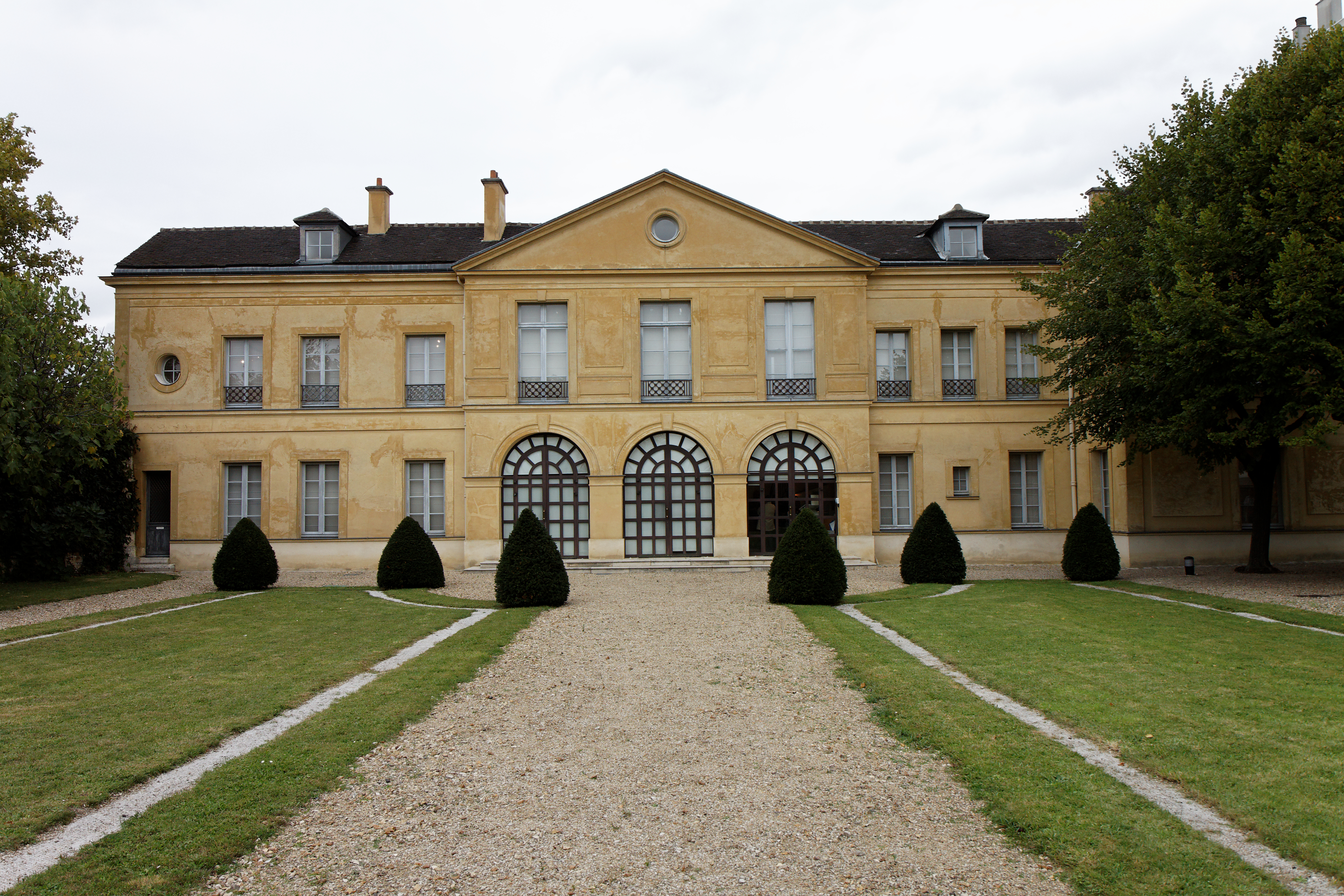 Le château de Réghat à Maisons-Alfort dans le Val-de-Marne. .